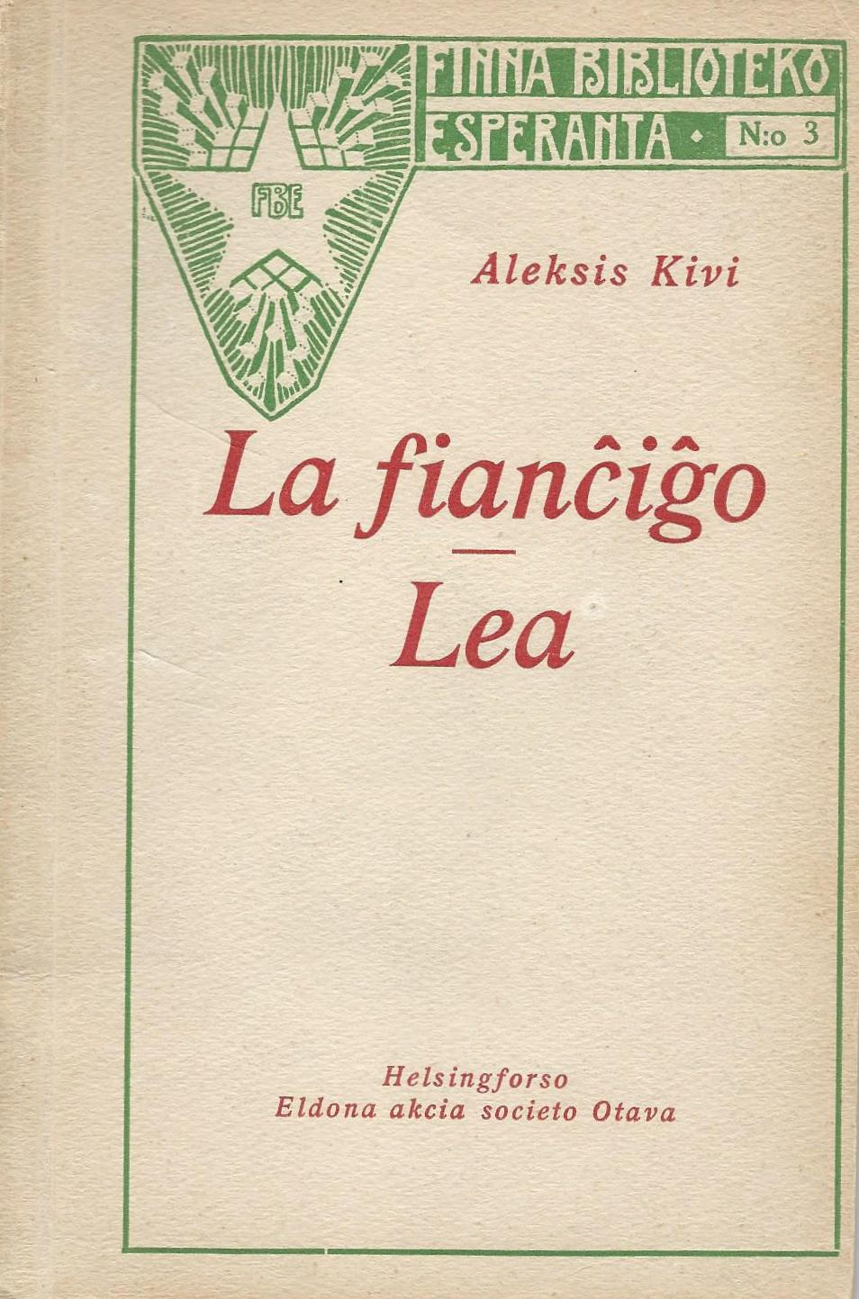 La Fianĉiĝo - Lea, 1920